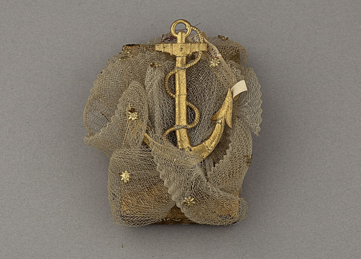 Bröllopskonfekt tillverkad av hovkonditor Johan Conrad Landelius (1823-1907).